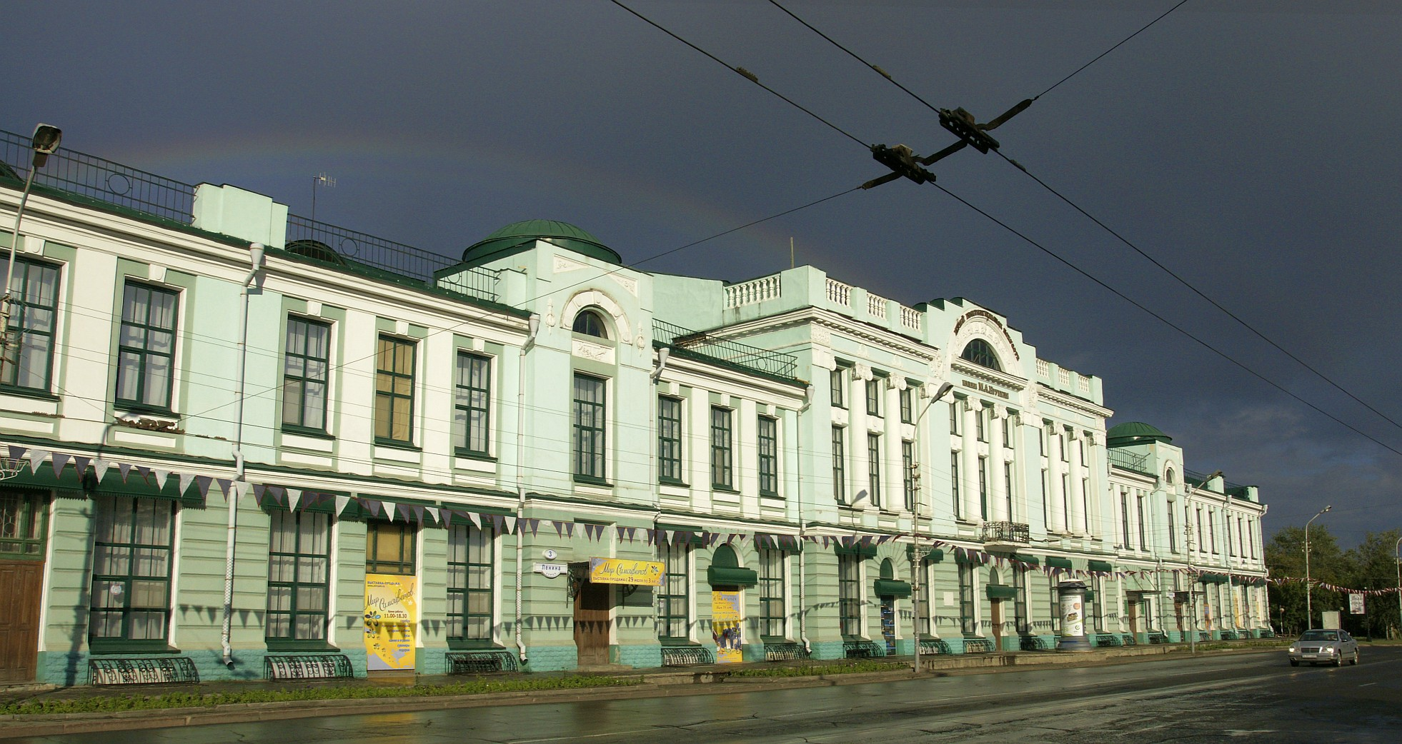 Административное здание. комплекс застройки (Омская область, Омск, улица Ленина, 3)